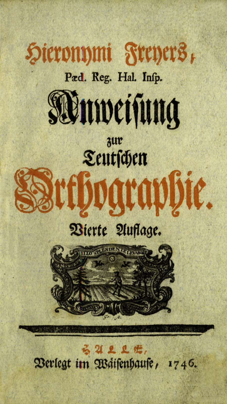 Hieronymus Freyer: Anweisung zur Teutschen Orthographie. Halle 1746.